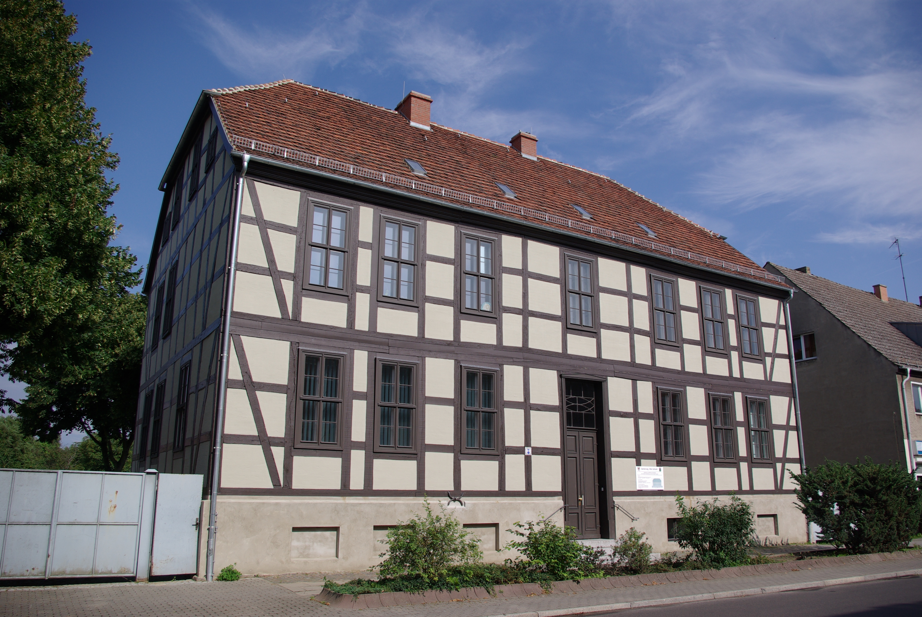 Friesack in Brandenburg. Das Haus in der Berliner Straße 11 Steht unter Denkmalschutz. Hier befand sich mal die Alte Schule.